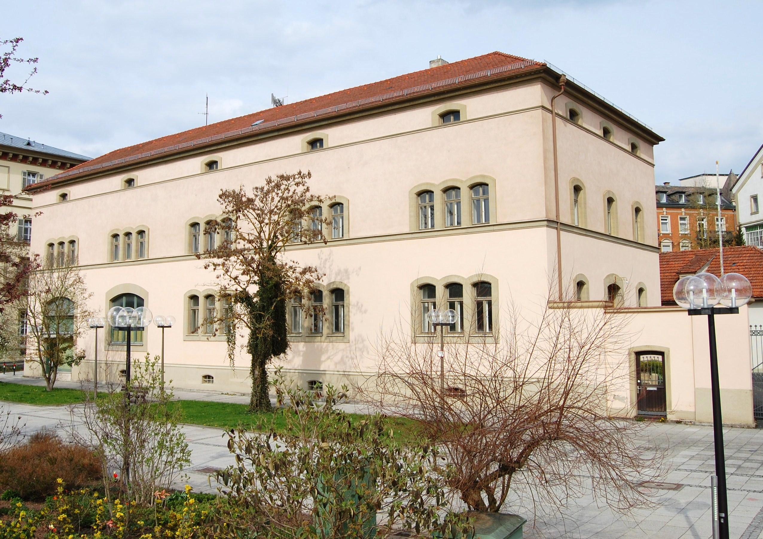 Krugmagazin in Bad Kissingen; Bauherr: Friedrich von Gärtner; Baujahr: 1836-1839